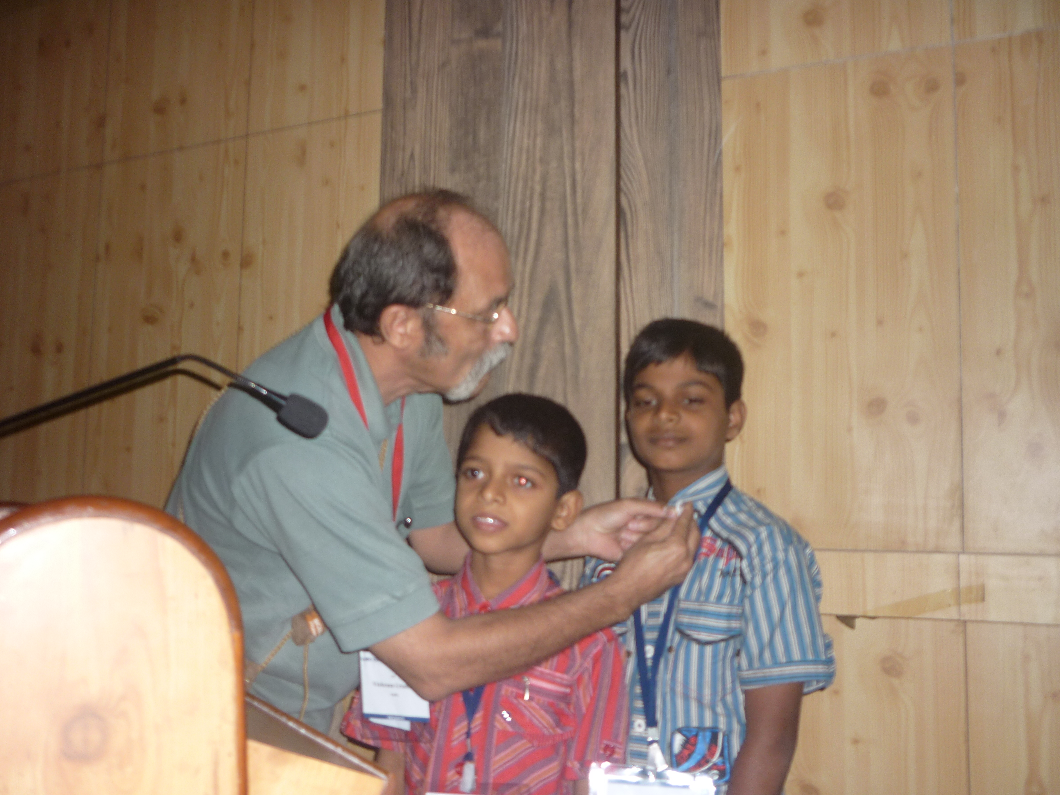 വിക്കി കോണ്‍ഫറന്‍സ് ഇന്ത്യയിലെ ഏറ്റവും പ്രായം കുറഞ്ഞ പ്രബന്ധ അവതാരകരായ അച്ചുകുളങ്ങരയും അശ്വിന്‍പ്രീതു